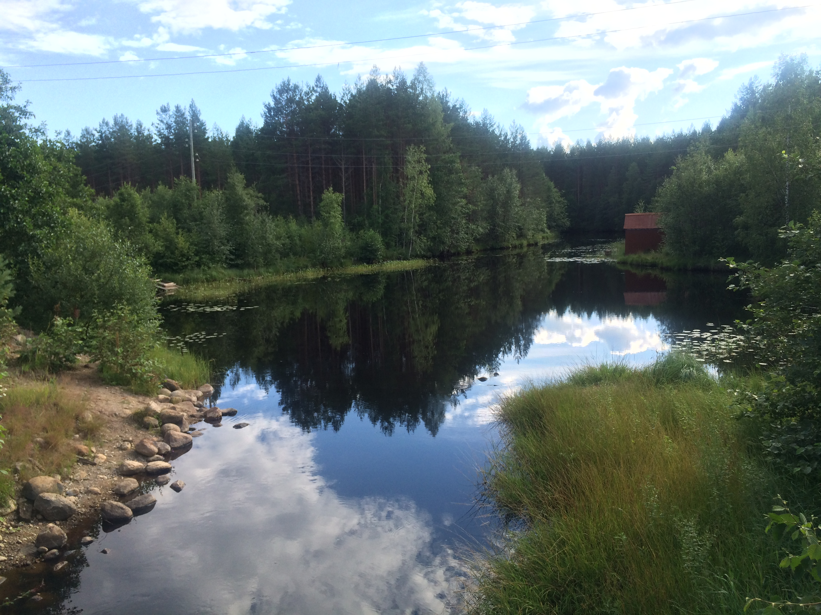 Кудама (река)